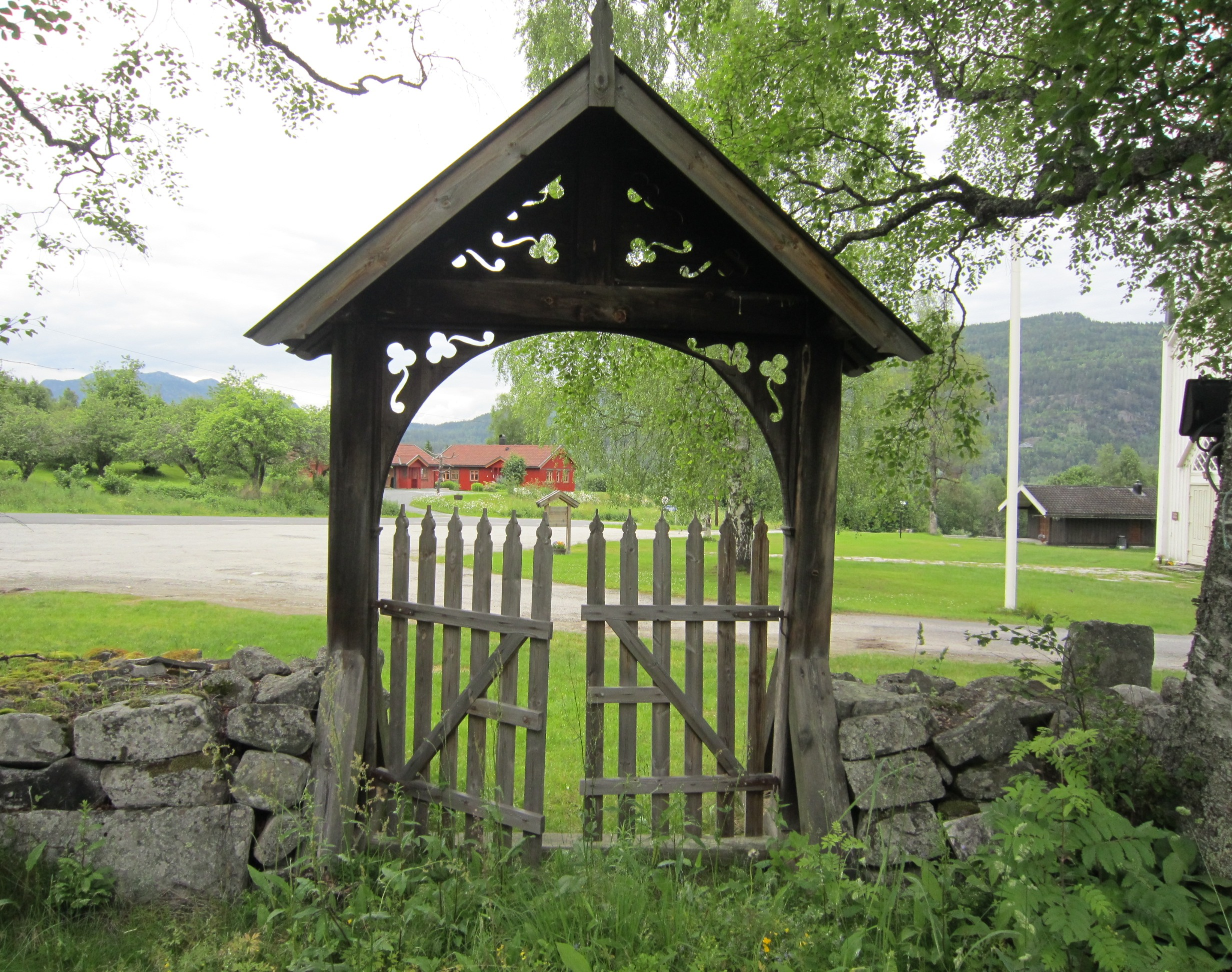 Ligrendvegen (fylkesvei 108) går forbi Veggli kirke, utenfor Veggli gamle kirkegård